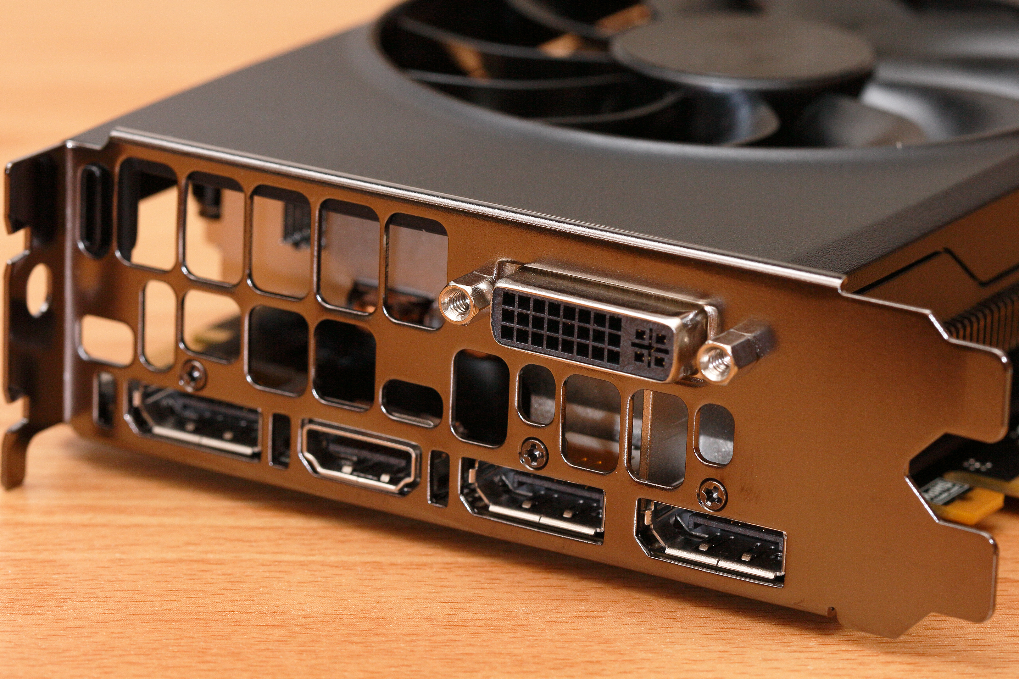 艾維克（EVGA）顯示卡「EVGA GeForce GTX 960 SuperSC ACX 2.0+」（型號為02G-P4-2966-KR）的輸出介面。